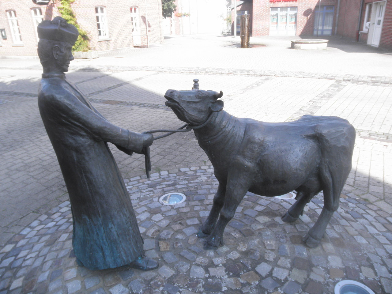 Bronza skulptaĵo "la pastora bovino" en Emsbüren